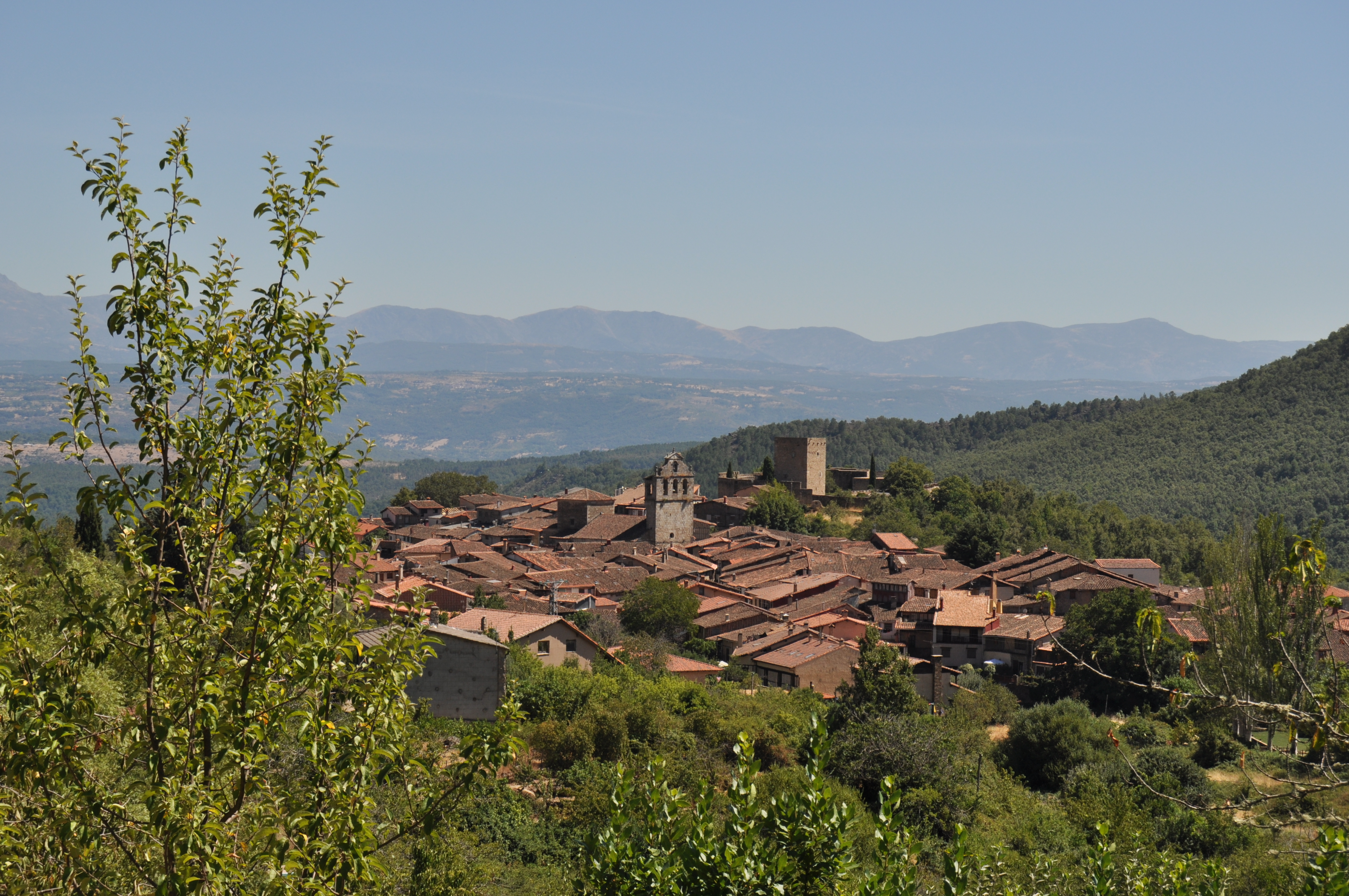 San Martín del Castañar - 001